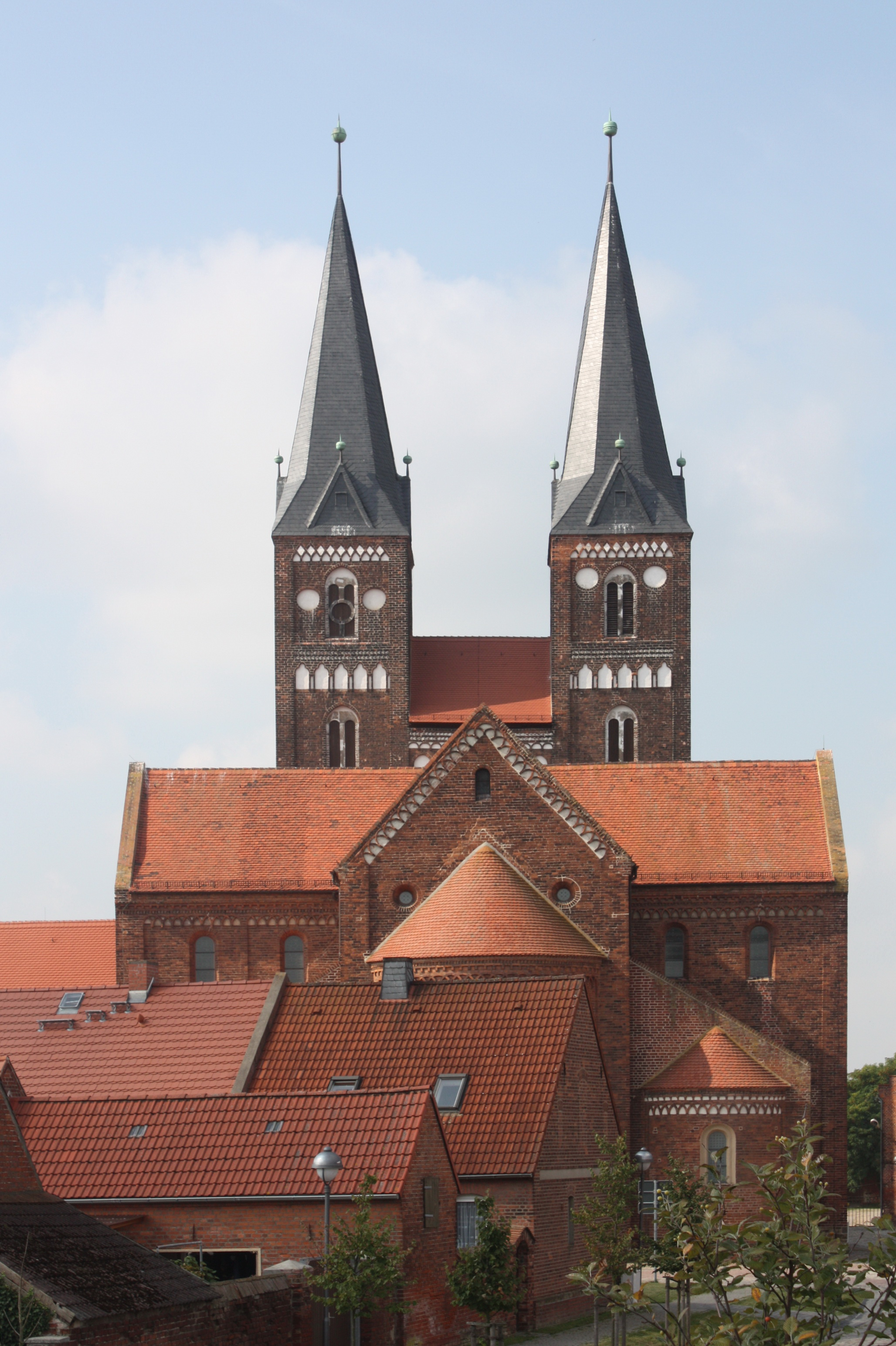 Ältester Backsteinbau Borddeutschlands, Romanik